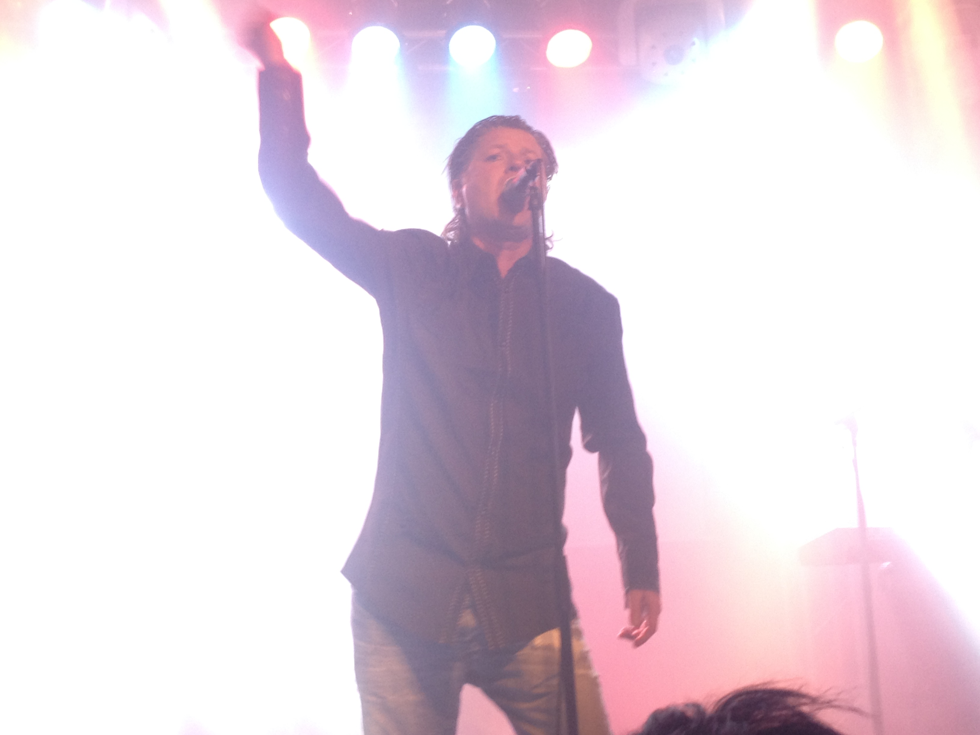 Carl Steinmarck i Saft på Göta Källare i Stockholm 9 maj 2015.